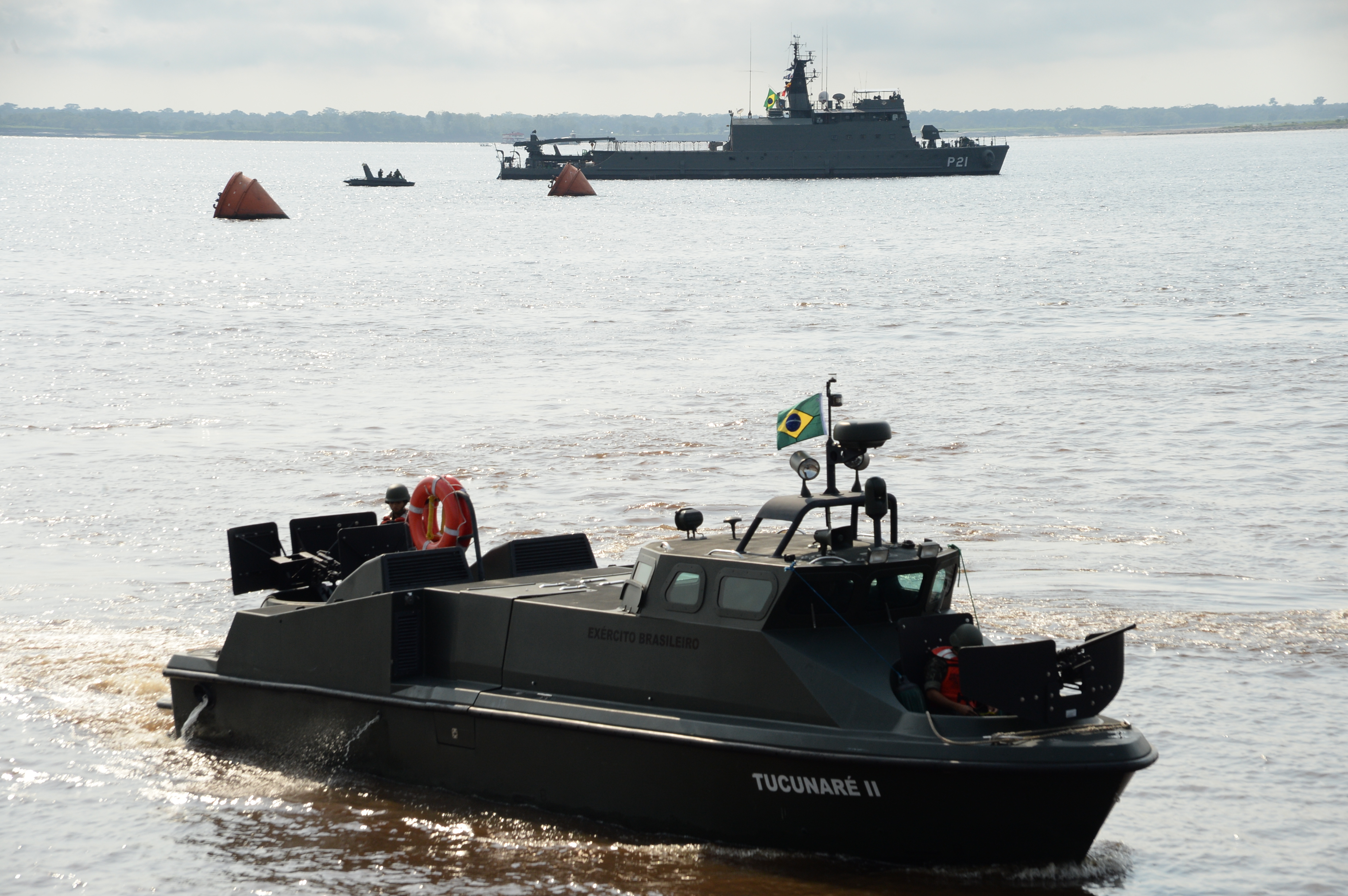 14/10/2014, Manaus - AM Fotos: Jorge Cardoso